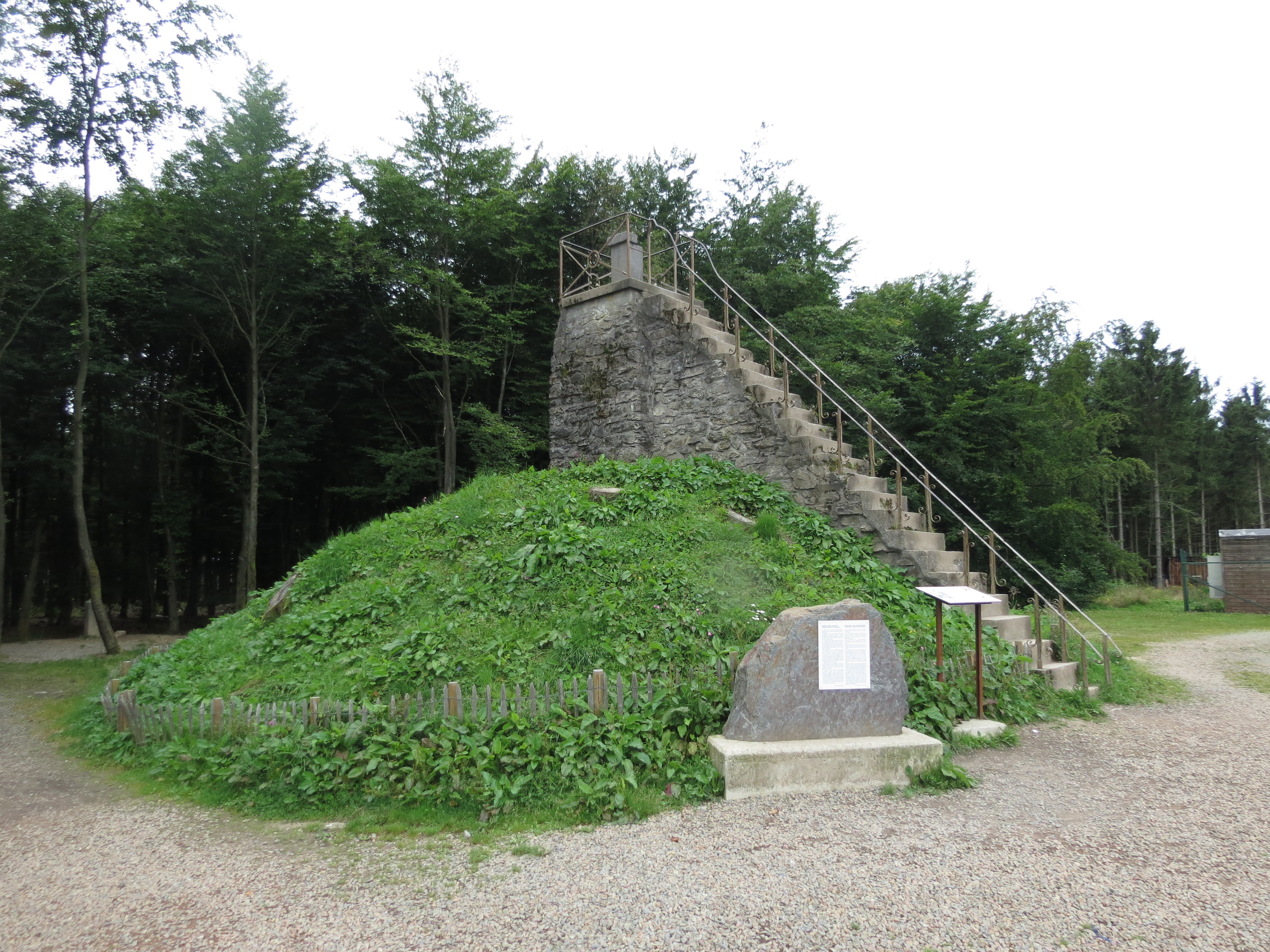 Butte Baltia (Botragne) in 2016